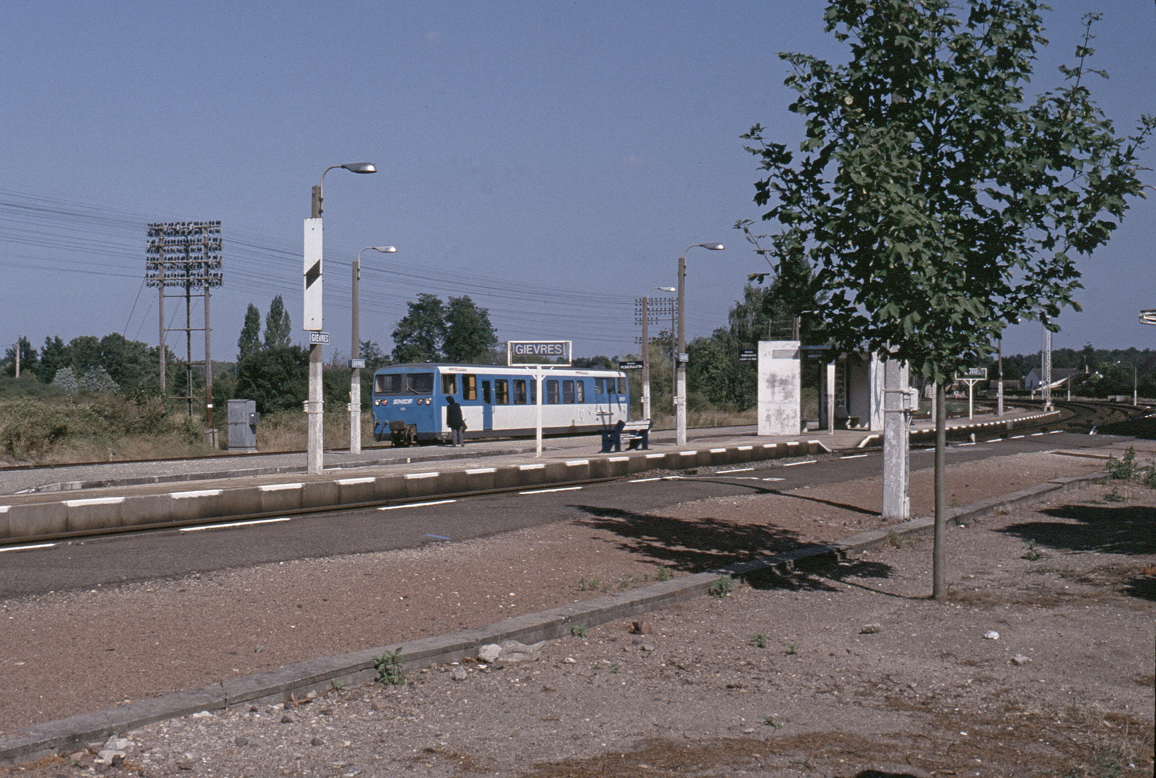 BA in Gièvres